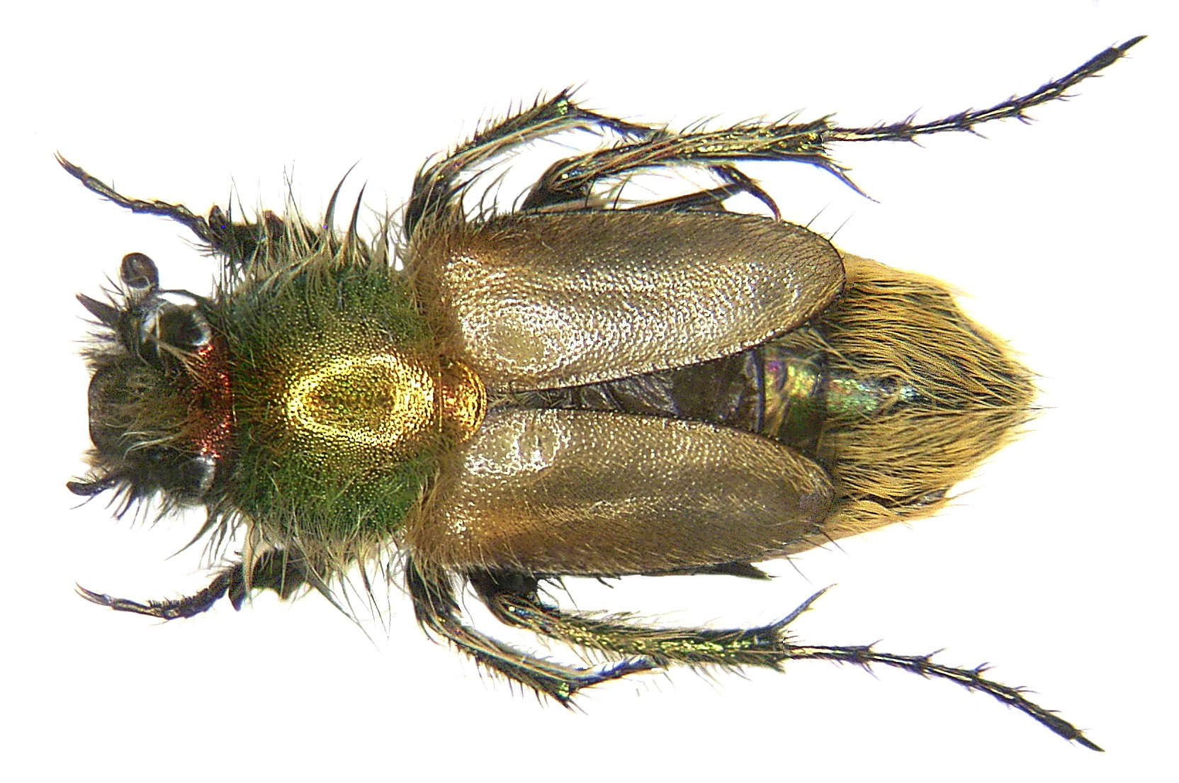 Eulasia diadema (Reitter, 1890). Familie: Glaphyridae Grösse: 11 mm Fundort: Türkei, Antalya, Belek leg. A.Skale, 2003; det. Rößner Foto: U.Schmidt, 2007